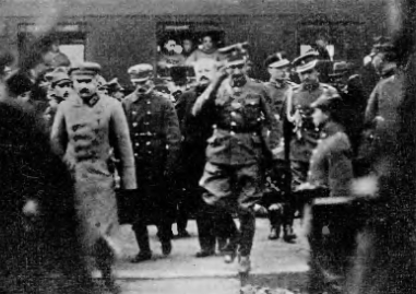 Józef Piłsudski w Ostrowie. Obok Naczelnika gen. Józef Dowbor-Muśnicki, gen. Zygmunt Zieliński i Bolesław Wieniawa-Długoszowski.